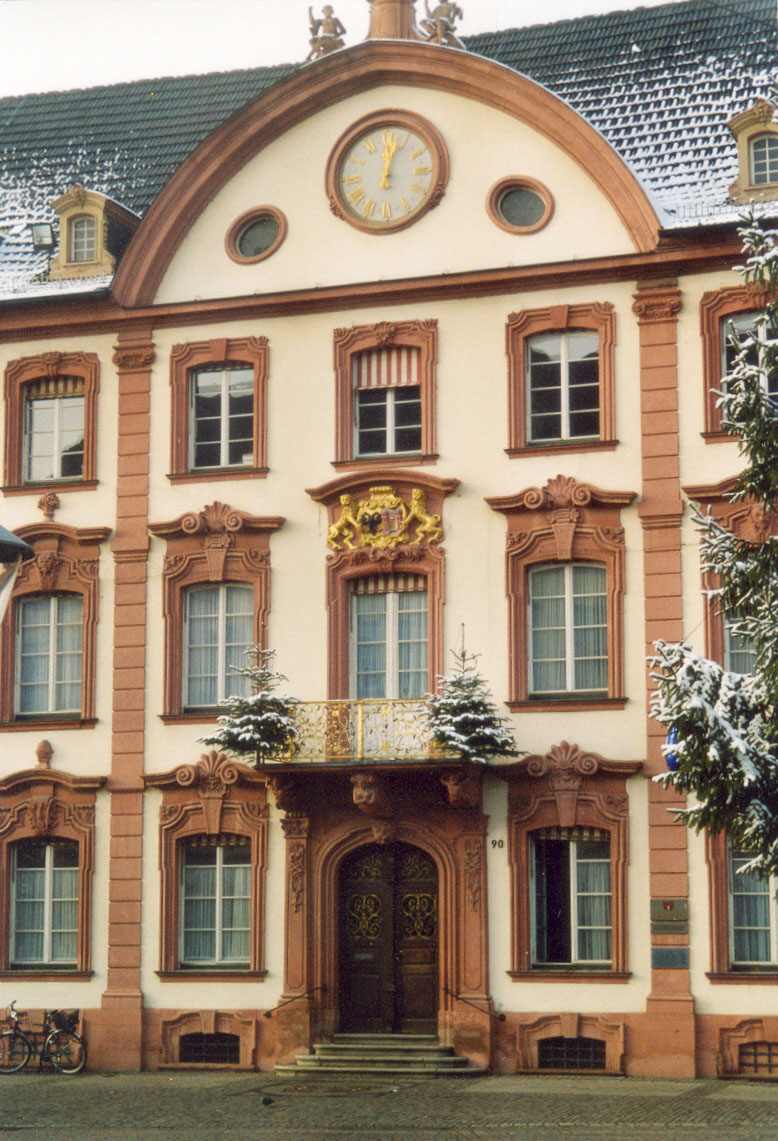 Offenburg, Deutschland. Der prächtige Mittelrisalit des barocken Rathauses.